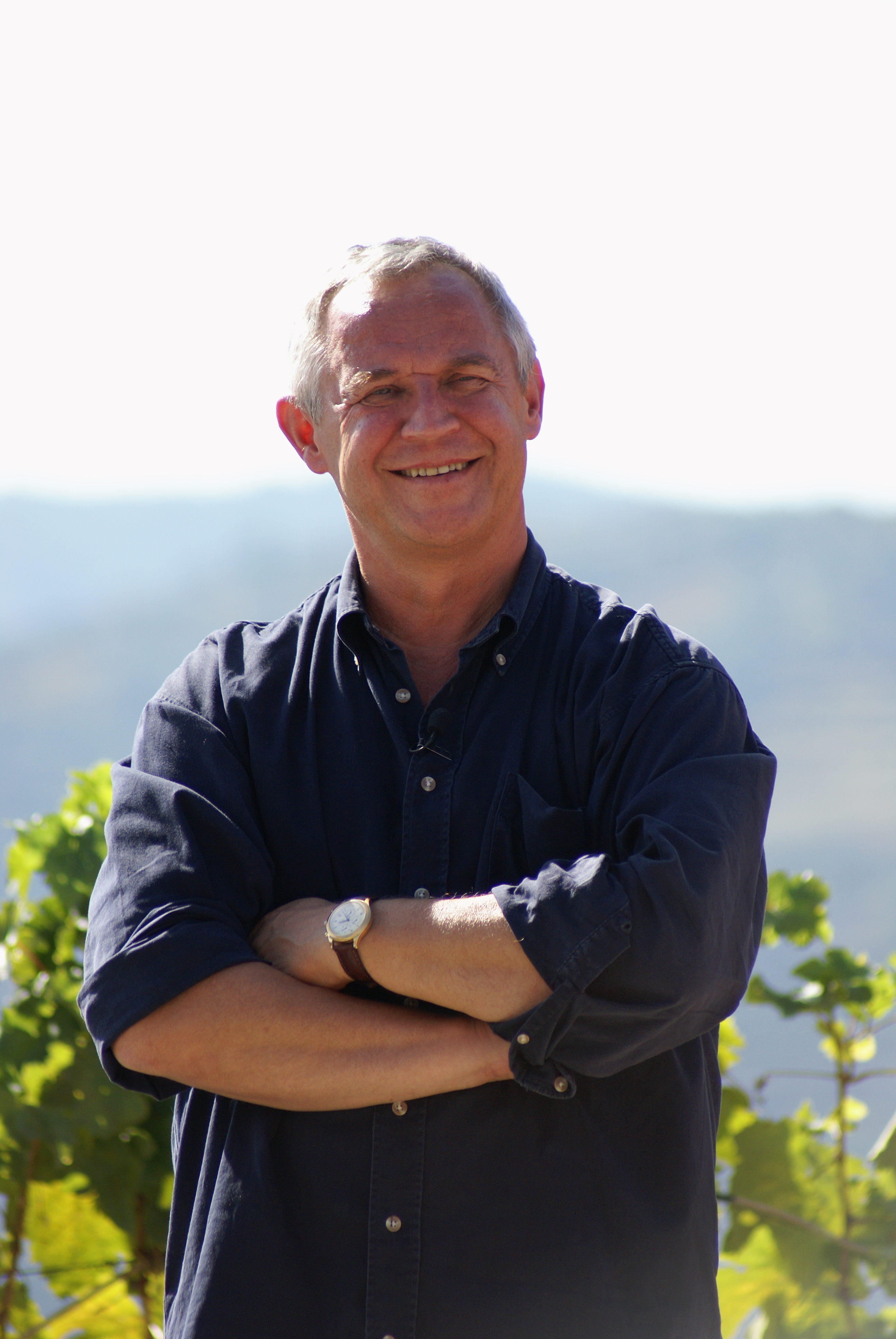 Marek Kondrat (Douro Portugalia)